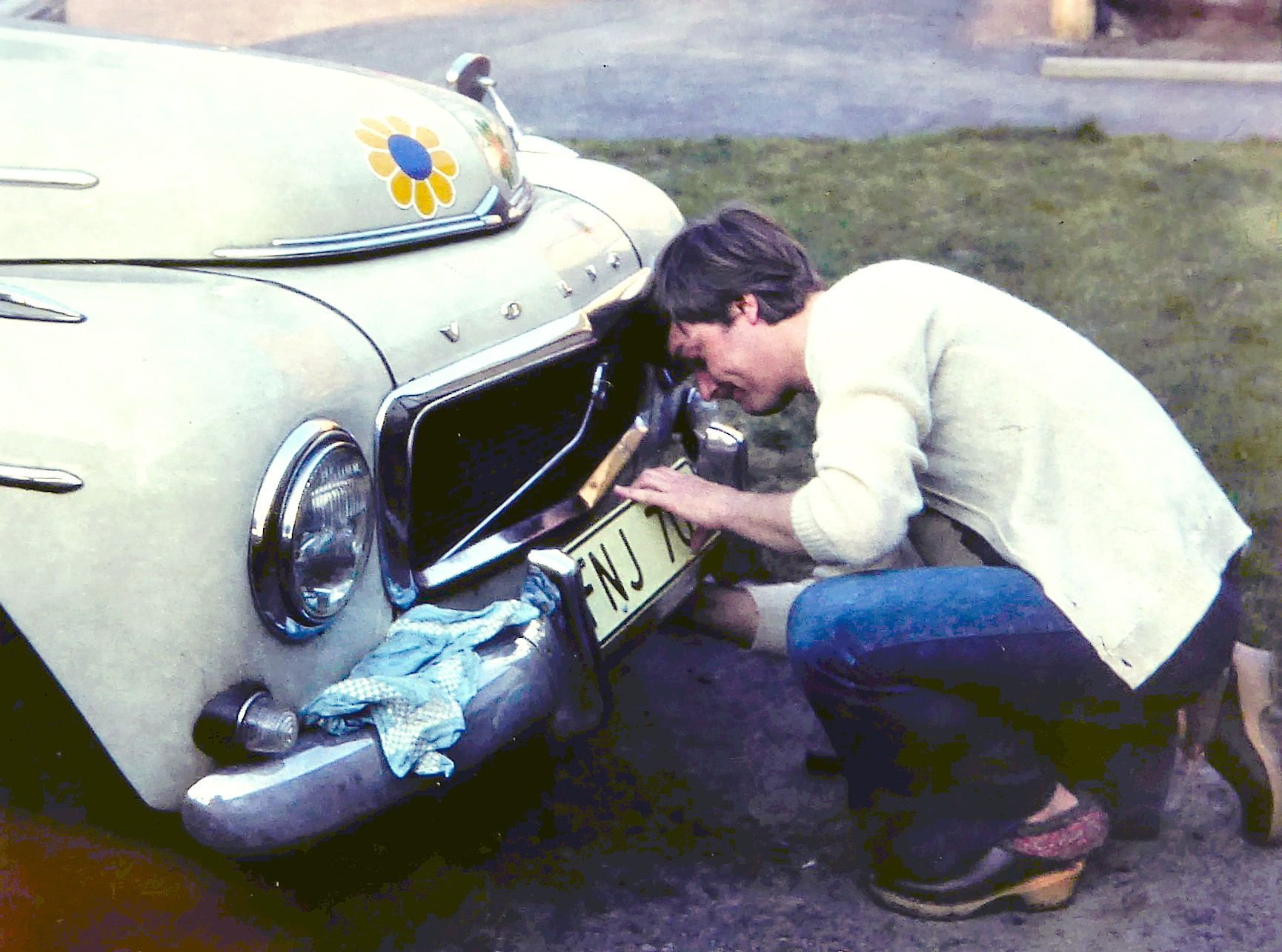 En bilägare byter till ny registeringsskylt